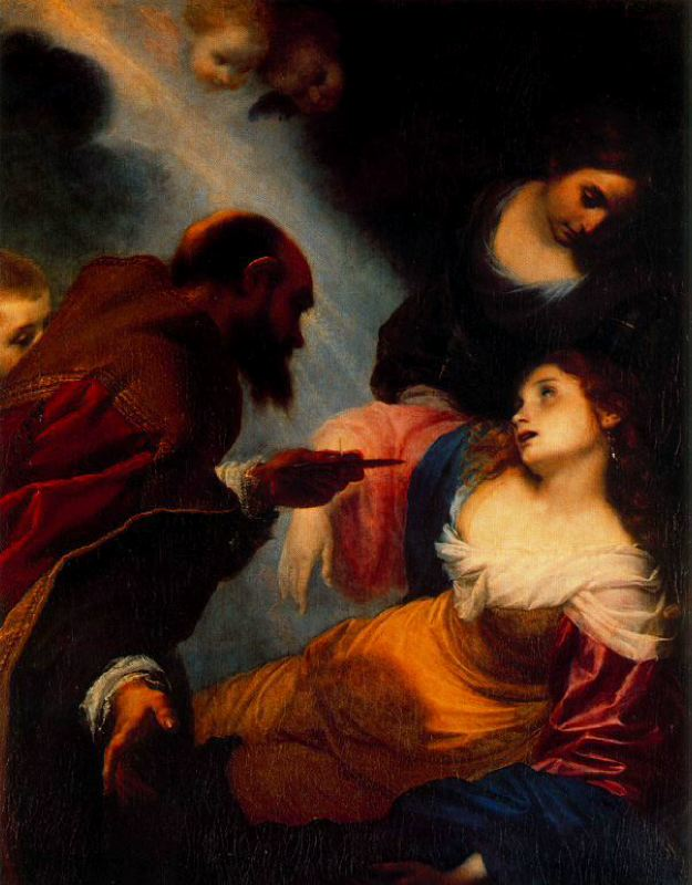 Muerte de Santa Petronilatitle QS:P1476,es:"Muerte de Santa Petronila" label QS:Les,"Muerte de Santa Petronila"